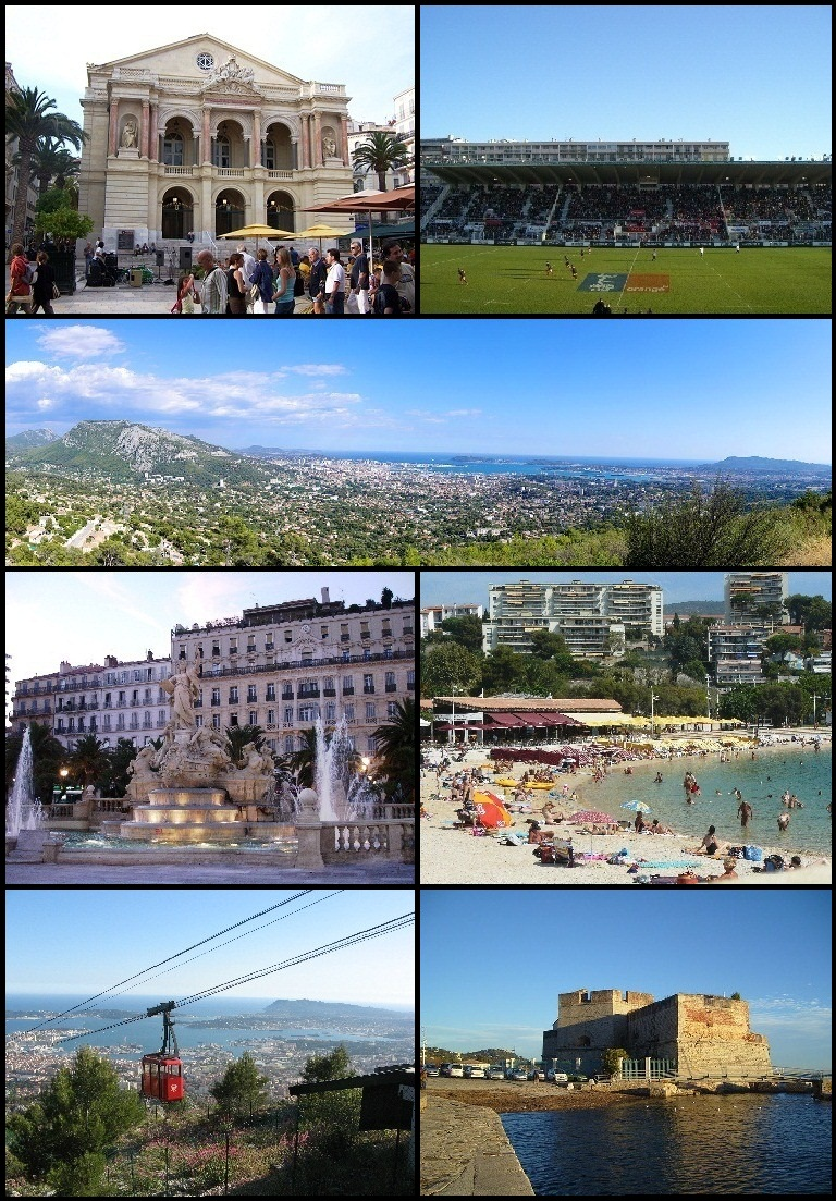 Images, De haut en bas et de gauche à droite : Opéra de Toulon de Baptiste Rossi Fichier:Opéra-Toulon.jpg Stade Mayol de Johnjohn83var Fichier:Stade Mayol.JPG Baou des 4 Oures de Lubranomaxime Fichier:Toulon Ouest vue panoramique.jpg Place de la Liberté de Pinpin Fichier:Toulon place de la liberté-fontaine.jpg Plage du Mourillon de Siren-Com Fichier:Plages du Mourilllon a Toulon.jpg Téléphérique du mont-Faron de Gfmorin Fichier:Mont Faron.jpg Fort Saint-Louis de SiefkinDR Fichier:Toulon Fort St. Louis (3).jpg